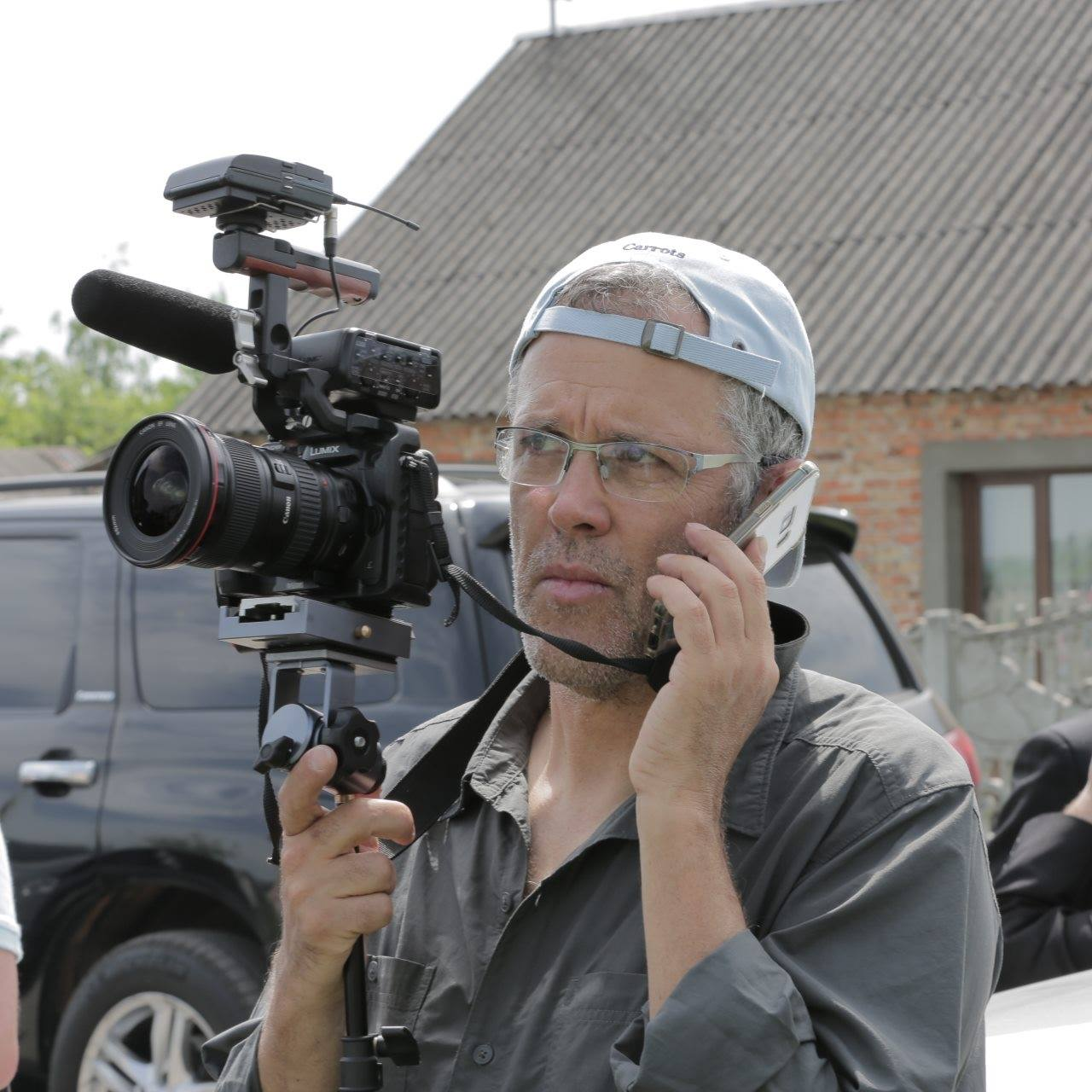 אורי רוזנווקס